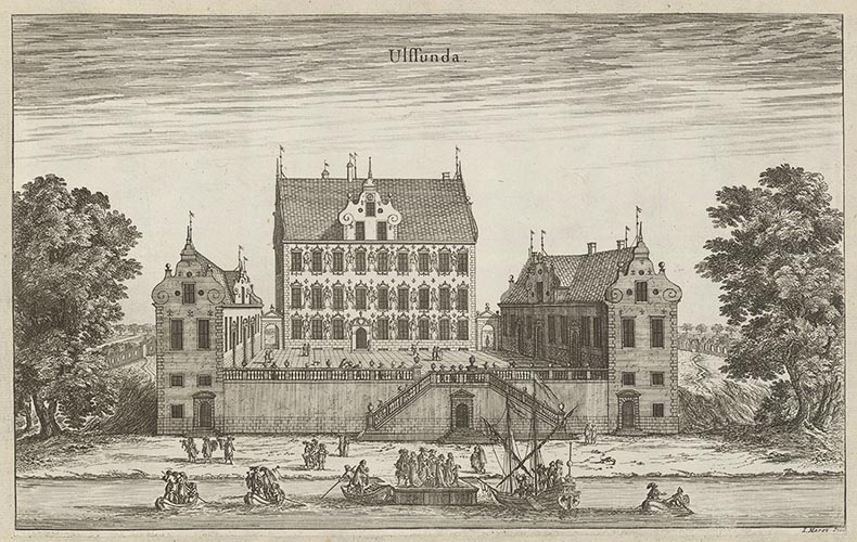 Ulfsunda : [Bild] / J. Marot fecit Marot, Jean, ca 1619-1679(Gravör) Dahlbergh, Erik, 1625-1703(Författare) 1 grafiskt bl. : kopparstick : s/v ; 21 x 34 cm